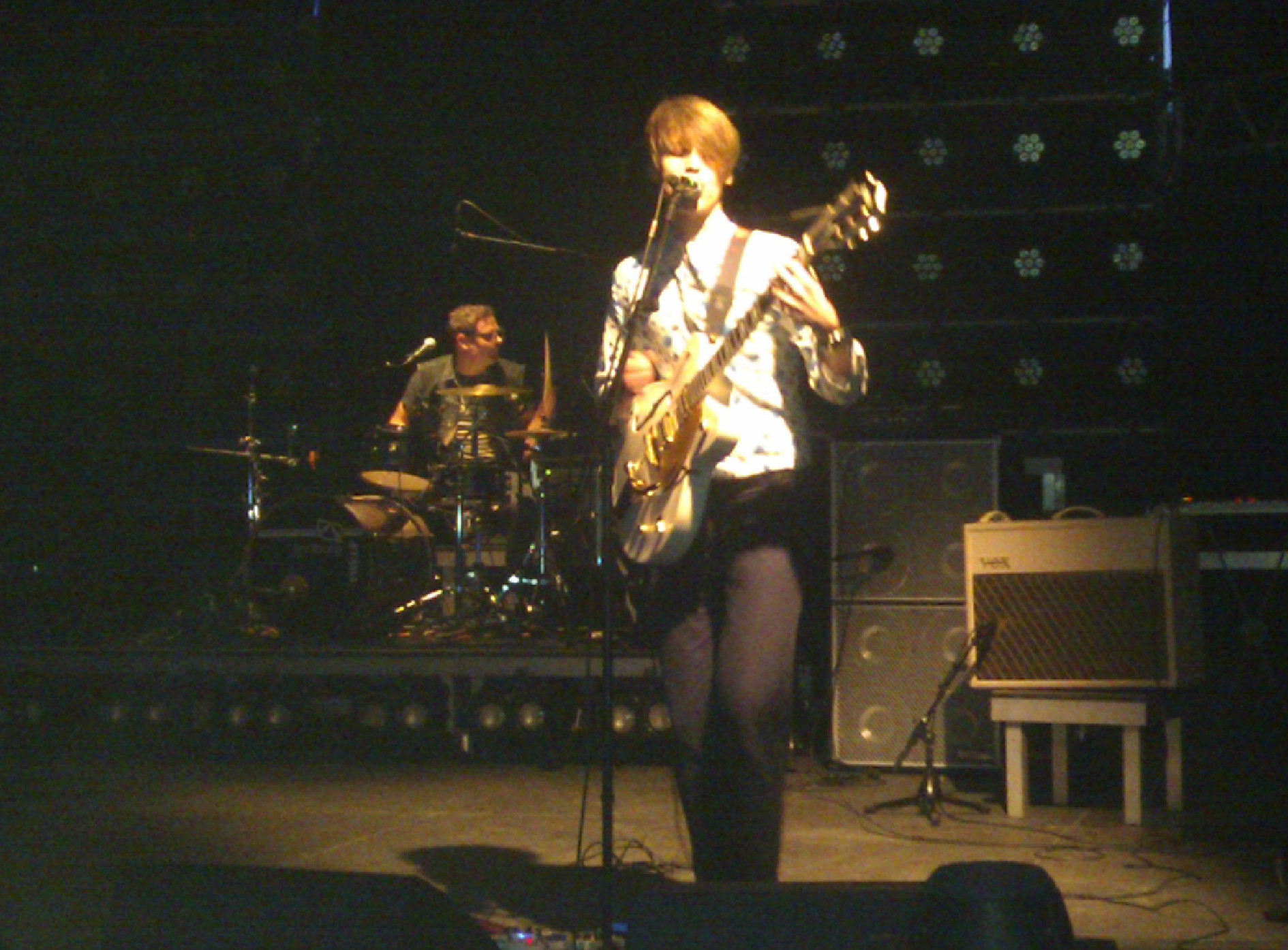 Elektrik Kezy Mezy bei Theatron MusikSommer 2014